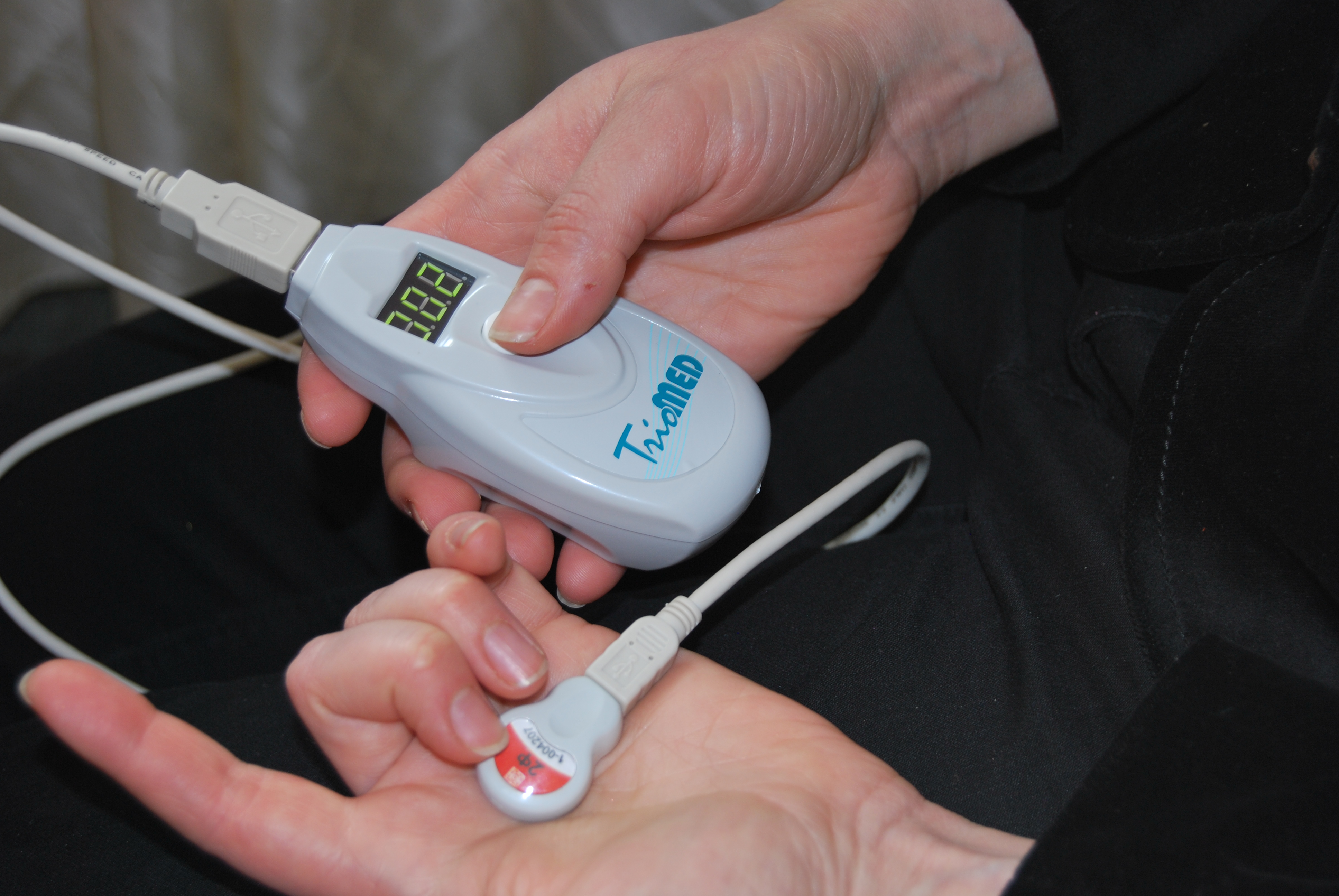 аппарат Триомед используется для лечения КВЧ-терапии в активных зонах